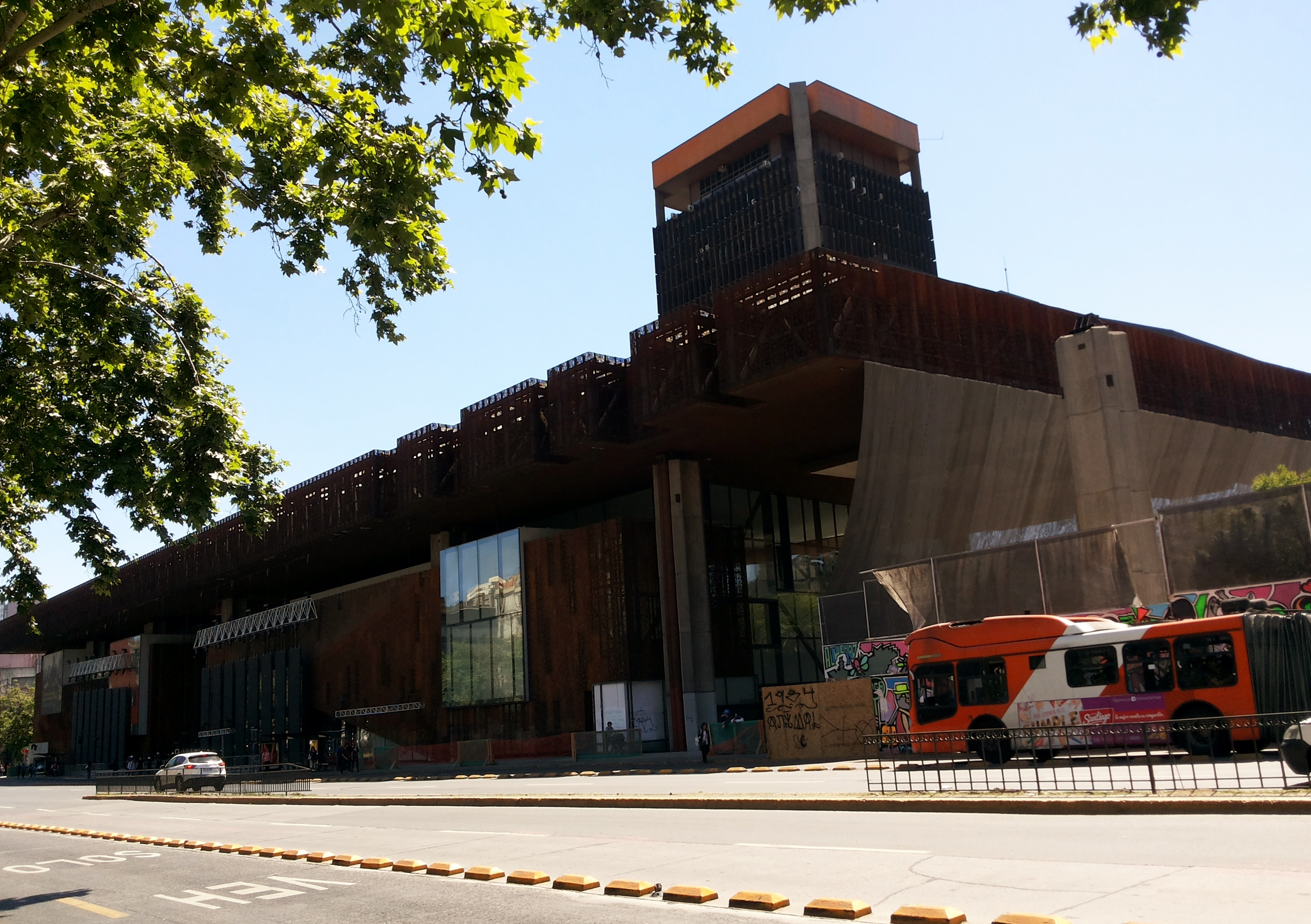 El Centro Cultural Gabriela Mistral (GAM), en Santiago de Chile, noviembre 2016.